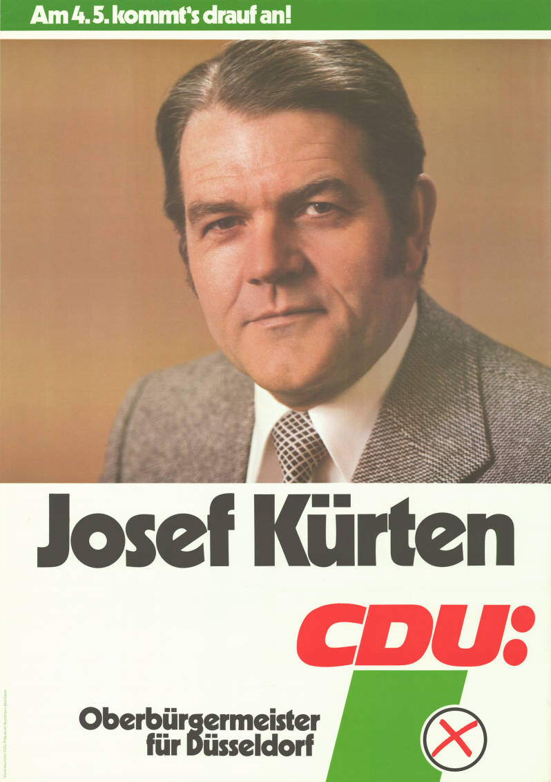 Am 4.5. kommt's drauf an! Josef Kürten CDU: Oberbürgermeister für Düsseldorf Abbildung: Porträtfoto - Stimmkreuz Plakatart: Kandidaten-/Personenplakat mit Porträt Auftraggeber: Verantw.: CDU-Präsidium Nordrhein-Westfalen Objekt-Signatur: 10-009 : 796 Bestand: Landtagswahlplakate Nordrhein-Westfalen (10-009) GliederungBestand10-18: Landtagswahlplakate Nordrhein-Westfalen (10-009) » CDU Lizenz: KAS/ACDP 10-009 : 796 CC-BY-SA 3.0 DE